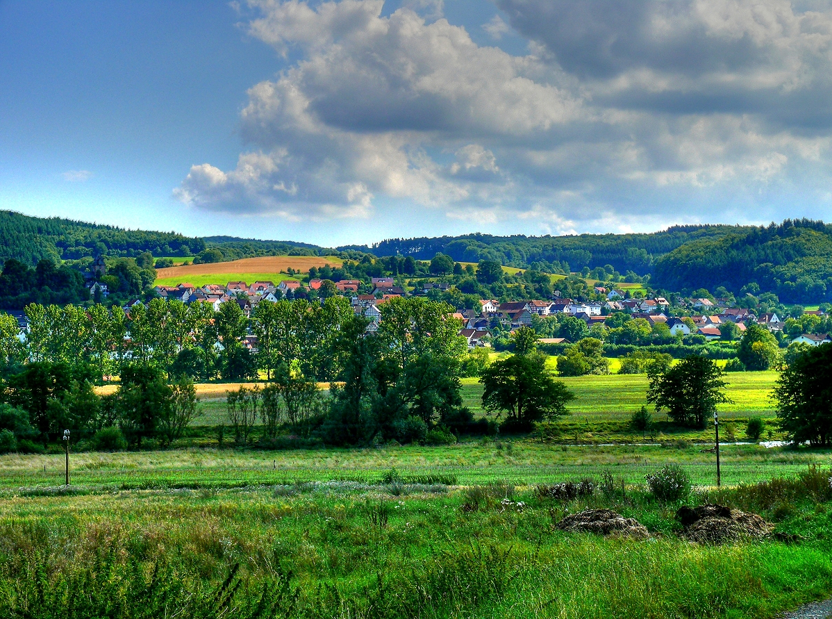 Blick auf den Lahntaler Ortsteil Caldern. Im Vordergrund die Strecken der Oberen Lahntalbahn und die Lahn. Links oben die Calderner Kirche mit den Resten des Zisterzienserinnen-Klosters. Im Hintergrund die Berge der Damshäuser Kuppen.